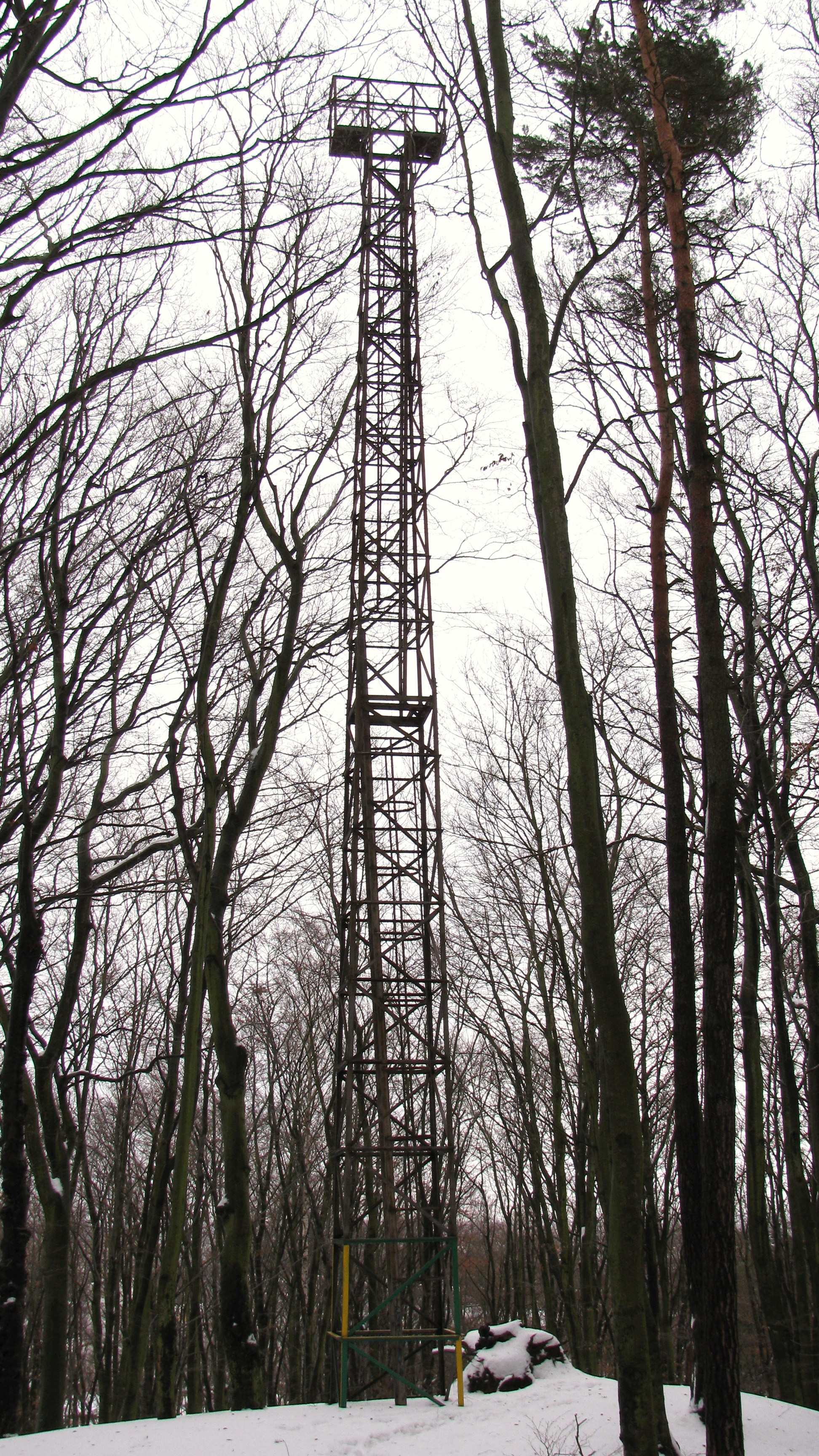 Stalowa wieża na wzniesieniu Głowica (zwanym również Wzgórzem Trzech Panów) w Gdańsku Oliwie.